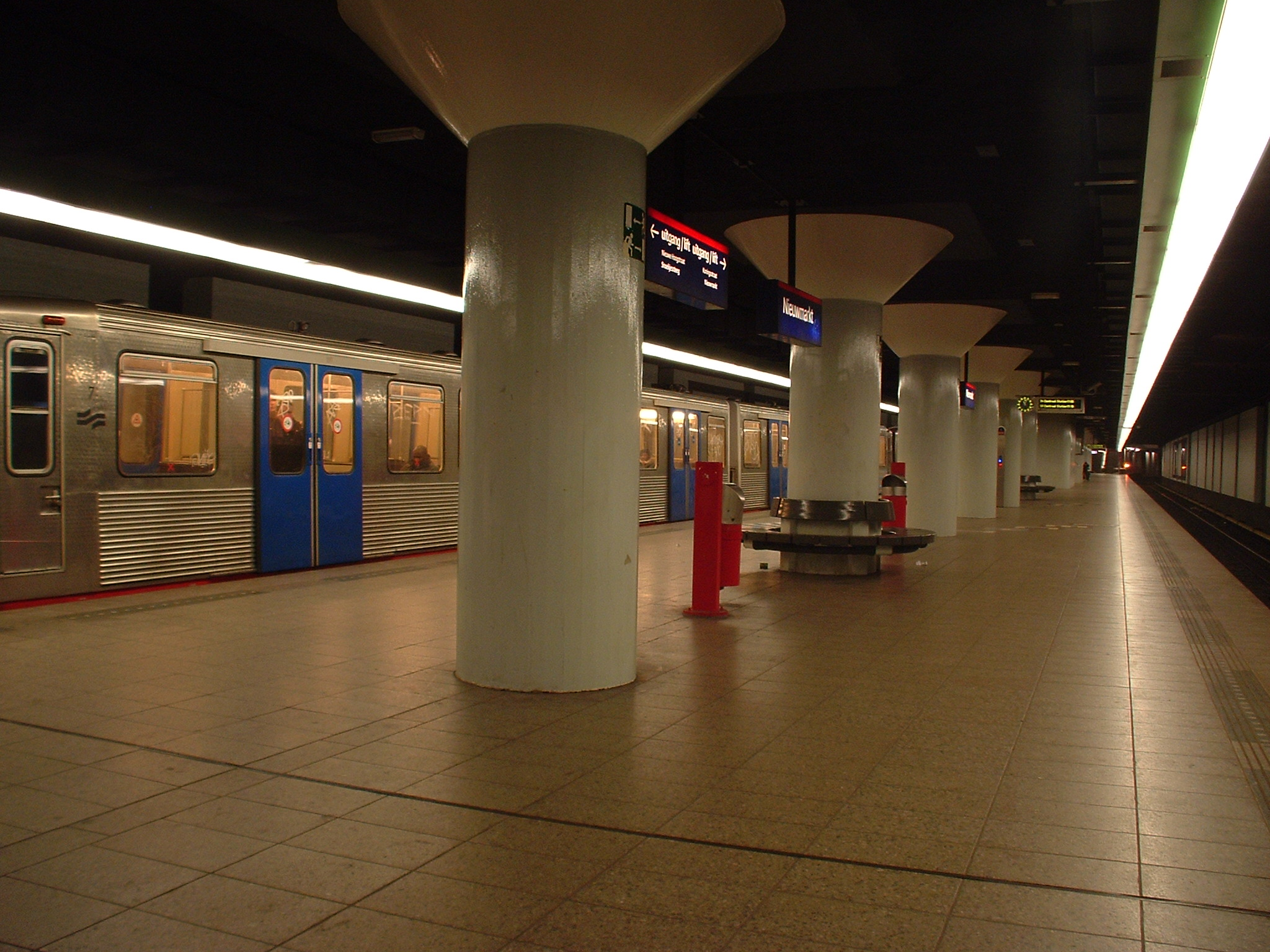 Metrostation Nieuwmarkt Foto: M.P. Tillema Categorie:Afbeelding metro